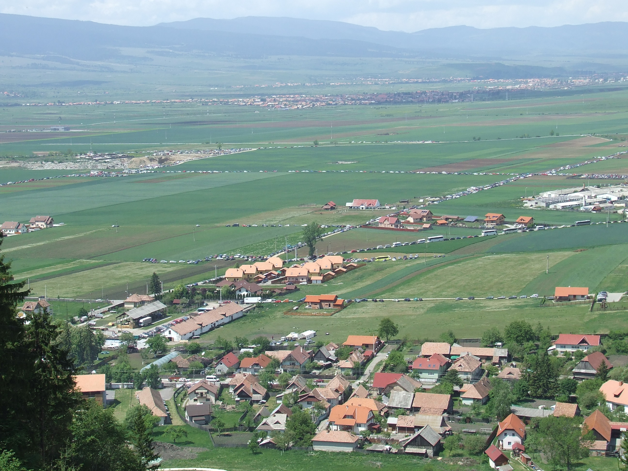 Erdély, Csíkszereda